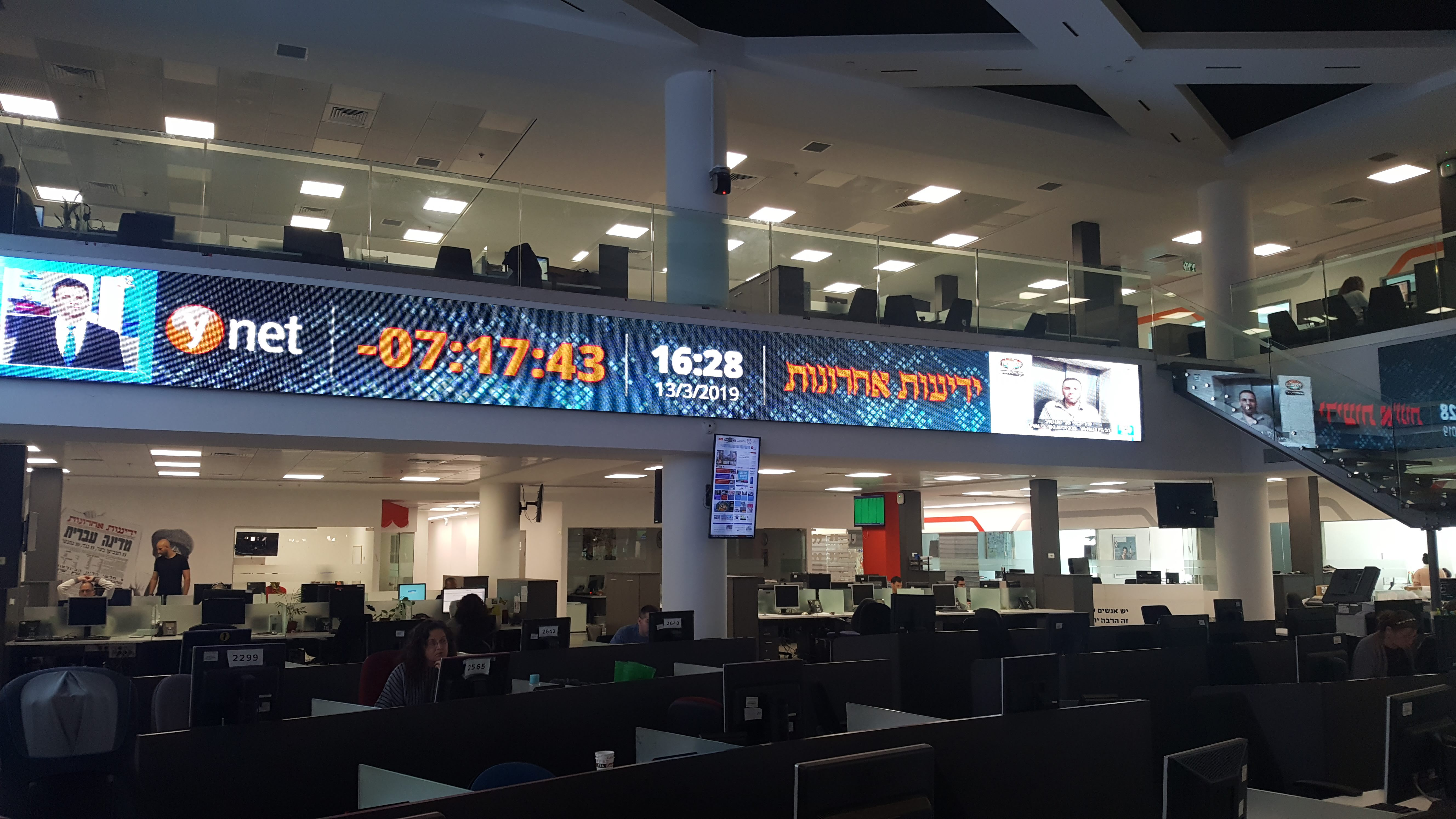 סיור אלף מילים במערכת Ynet